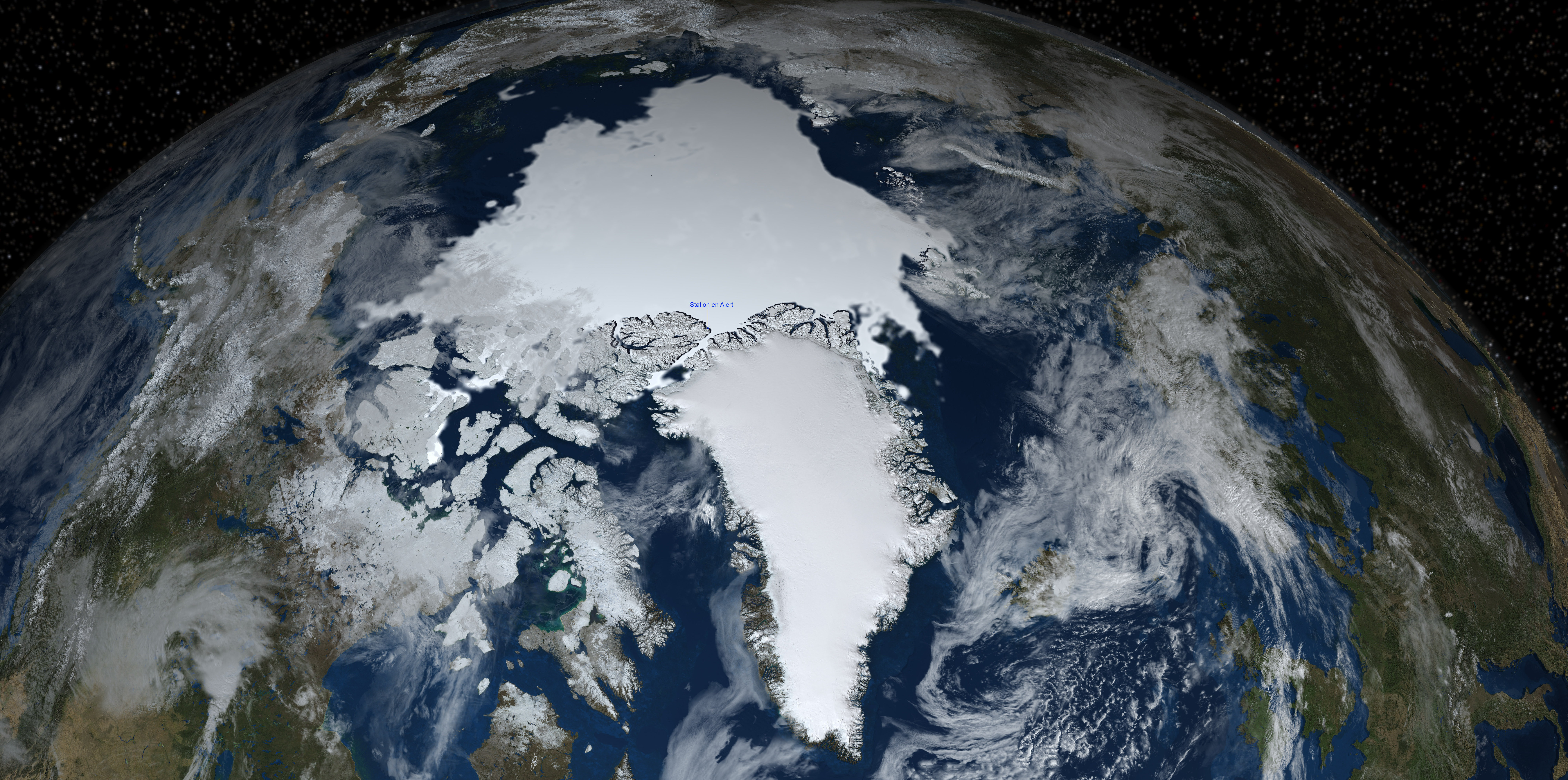 Extension de la banquise au 15 septembre 2008 déterminé par le satellite AMSR-E. La terre montre la moyenne de la couverture neigeuse pour septembre 2004 (Blue Marble Next Generation). Les nuages sont obtenus par Blue Marble 2002 (Blue Marble:Clouds). Une partie de l'hémisphère nord de la Terre avec la banquise, nuage, étoile et localisation de la station météo en Alert